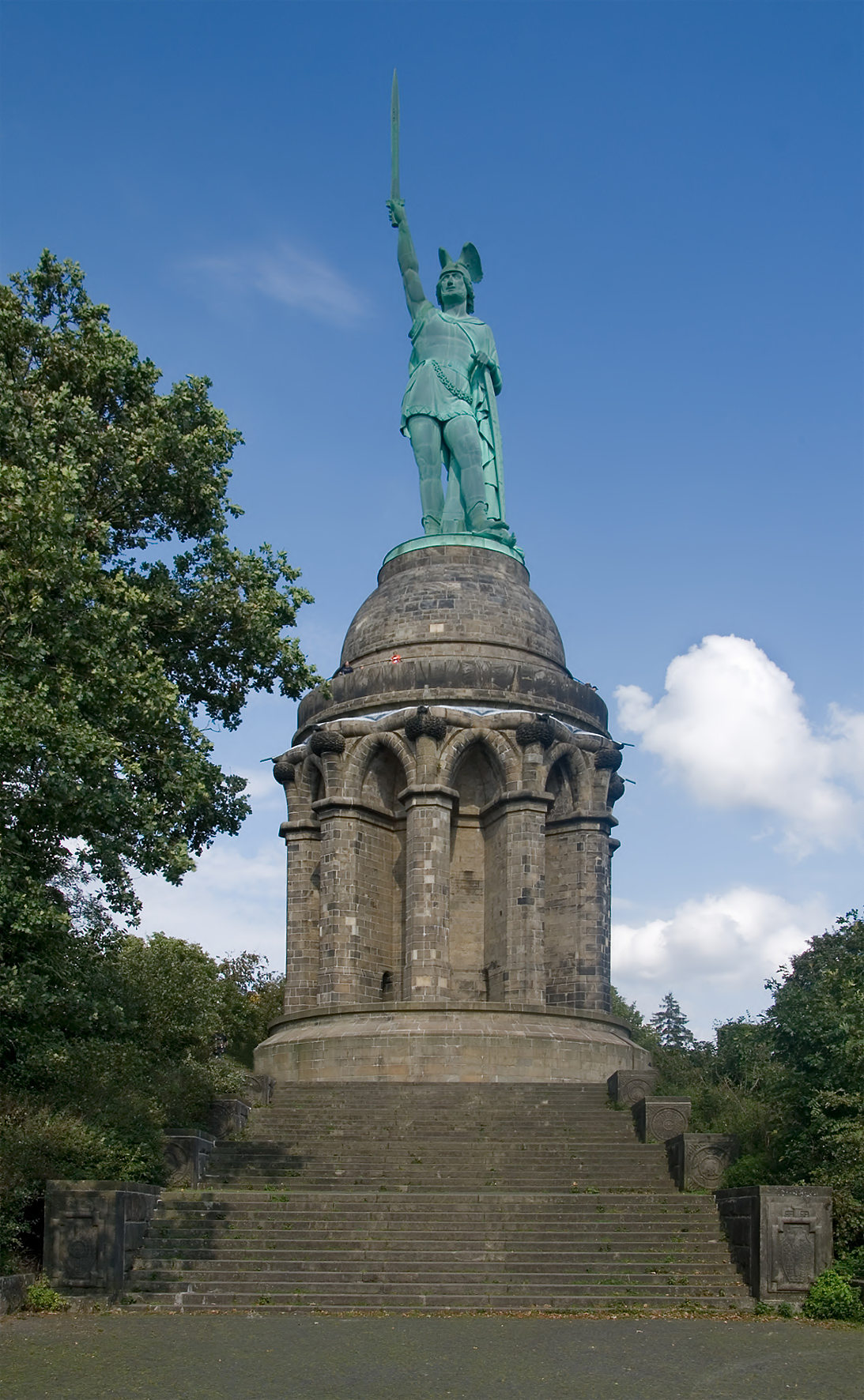 Hermannsdenkmal im Teutoburger Wald